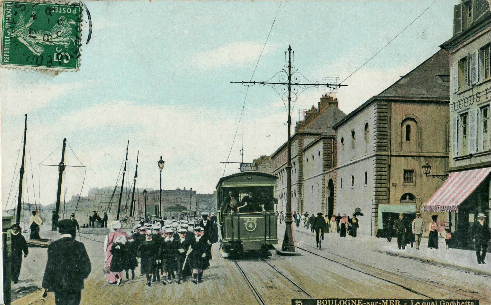 Carte postale éditée par L. V. & Cie, n°25 : BOULOGNE-SUR-MER - Le Quai Gambetta.Vue en gros plan de la motrice n°37 du tramway de Boulogne-sur-Mer circulant sur la ligne 4 Casino - Dernier-Sou